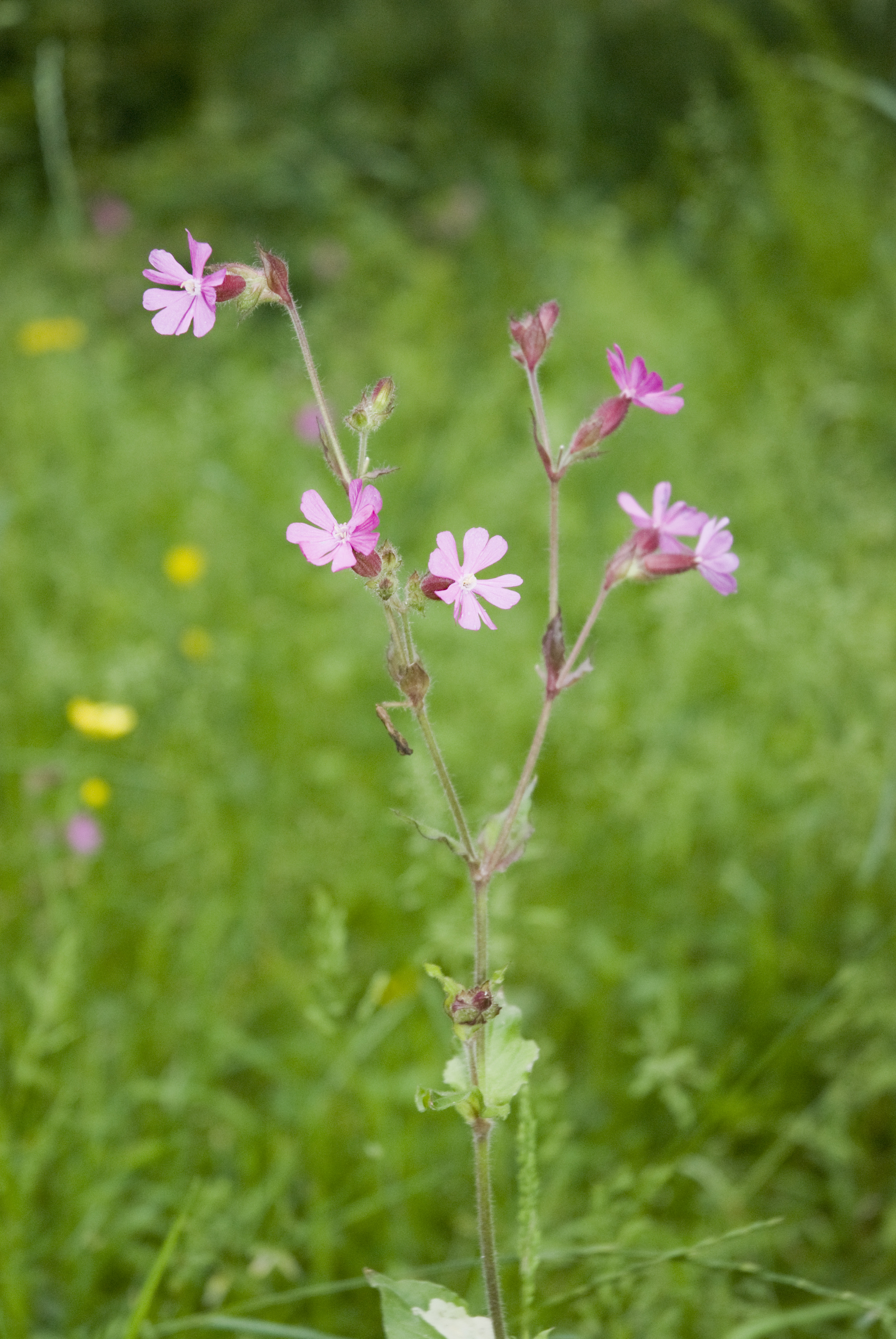 Silene dioica Forêt domaniale de Saint-Michel (Aisne), France